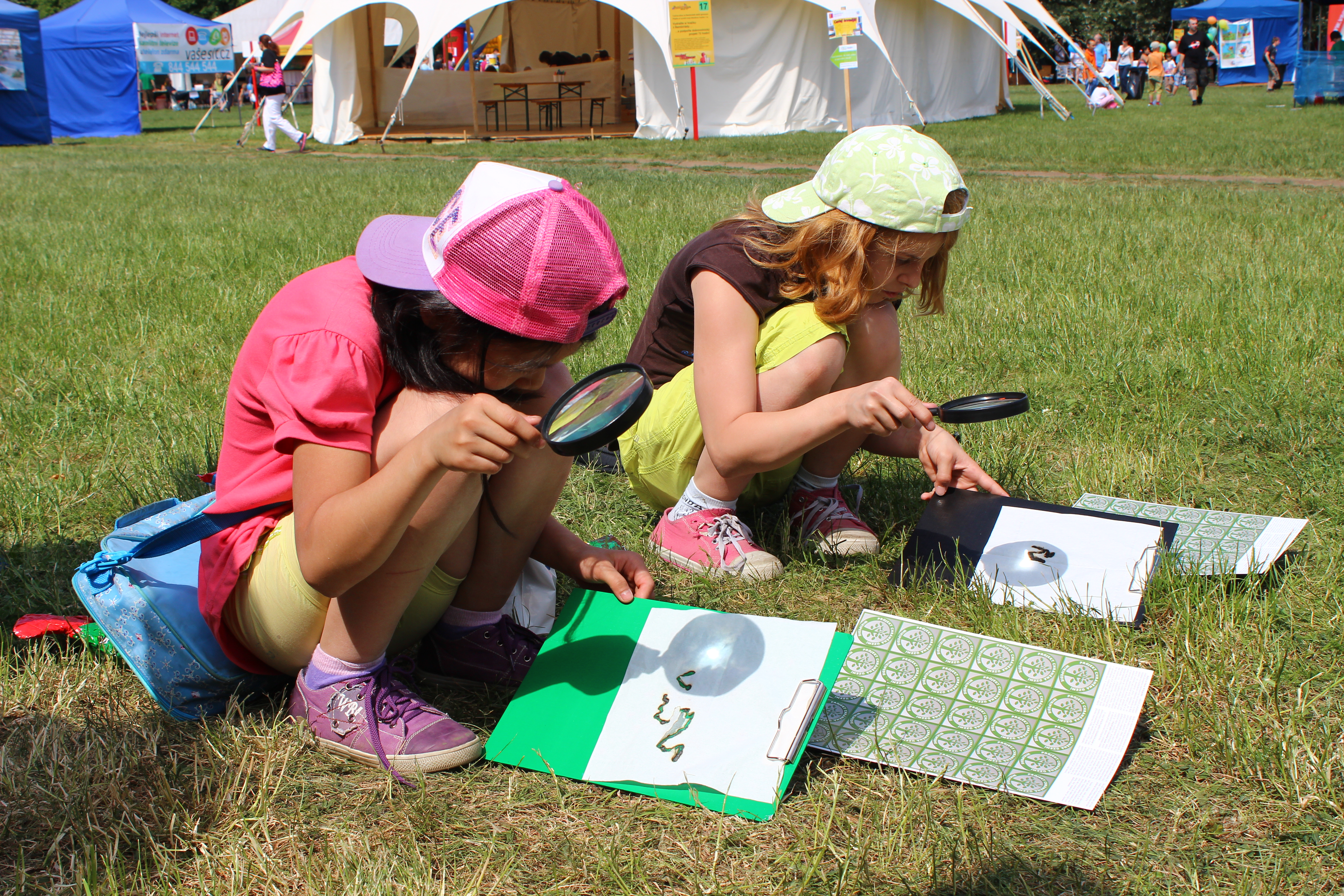 Bambiriáda je největší přehlídka činnosti sdružení, která pracují s dětmi a mládeží, a středisek volného času. Heslem ročníku 2012 bylo: Nadšení i zkušenost This photograph was taken with a DSLR from WMCZ's Camera grant.